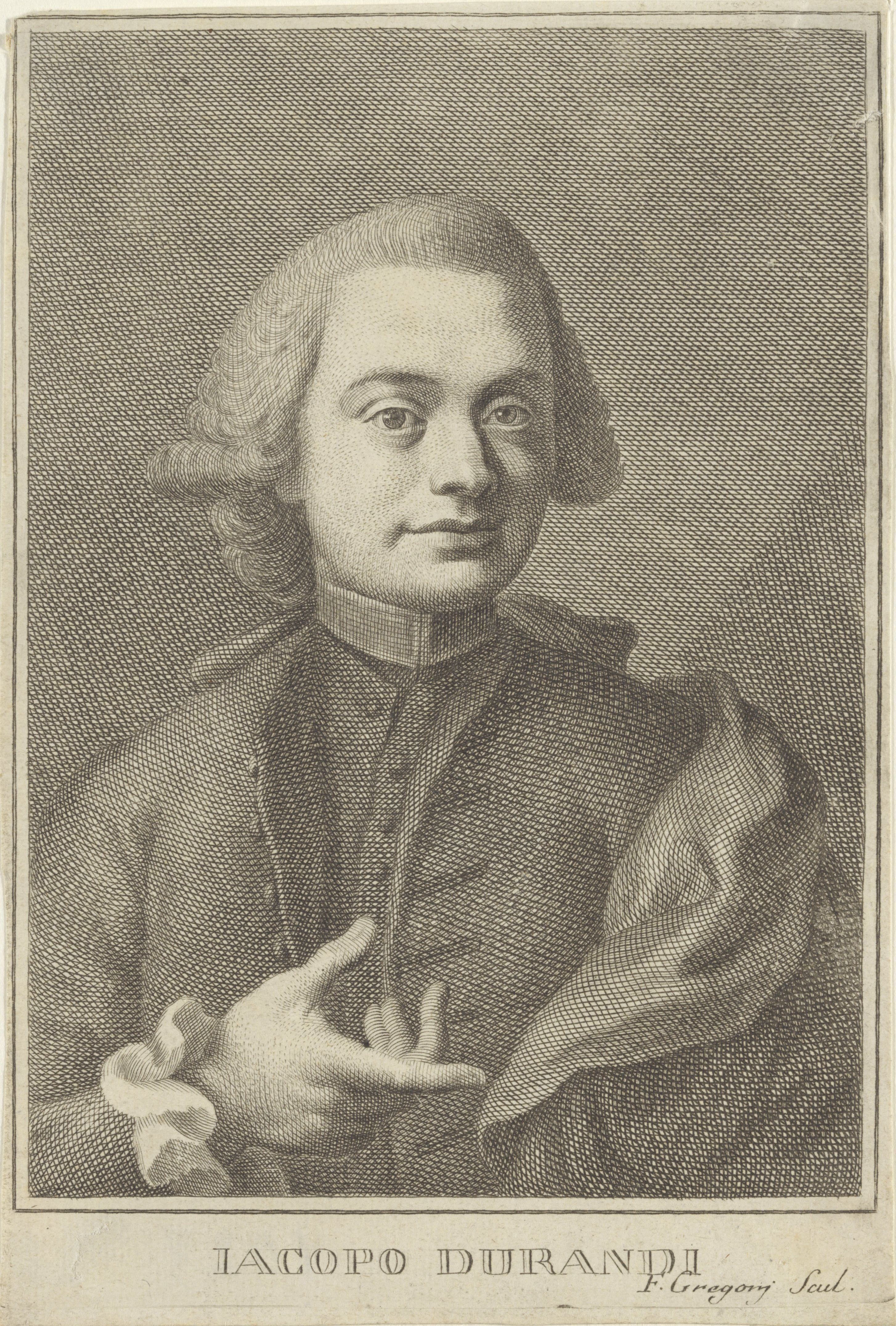 IdentificatieTitel(s): Portret van Jacopo DurandiObjecttype: prent Objectnummer: RP-P-1937-1102Opschriften / Merken: verzamelaarsmerk, verso, gestempeld: Lugt 2228VervaardigingVervaardiger: prentmaker: Ferdinando Gregori (vermeld op object)Plaats vervaardiging: ItaliëDatering: 1753 - 1804Fysieke kenmerken: gravureMateriaal: papier Techniek: graveren (drukprocedé)Afmetingen: blad: h 170 mm (Binnen plaatrand afgesneden.) × b 115 mm (Binnen plaatrand afgesneden.)OnderwerpWat: historical personsWie: Jacopo DurandiVerwerving en rechtenVerwerving: onbekend 1937Copyright: Publiek domein